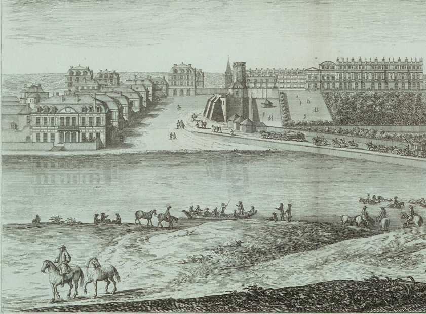 Détail d'une estampe de Versailles par Israël Silvestre